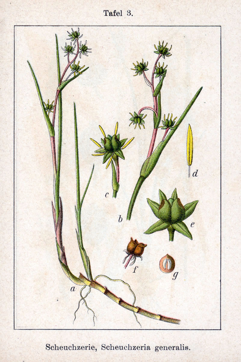 Scheuchzeria palustris Original Caption Scheuchzerie, Scheuchzeria generalis